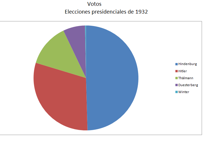 Resultado de la primera vuelta de las elecciones presidenciales alemanas de 1932 (13th march 1932).